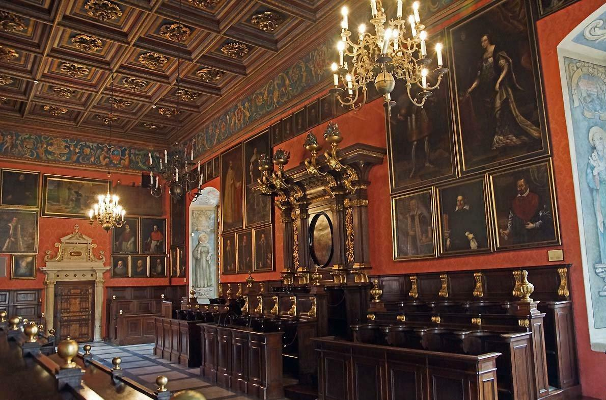 Tu zasiadają JM Rektor, profesorowie,...